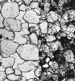 À gauche, cristaux de quartz normaux, à droite, cristaux de quartz choqués par un impact météoritique. Contents 1 Auteur 2 Licensing 3 Licensing 4 Original upload log Auteur Réalisation personnelle de Frédéric (à partir d'extraits de photos de laboratoires) Licensing Réalisation personnelle --Frédéric 24 mai 2006 à 17:23 (CEST)